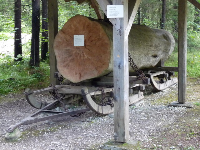 Holzknechtmuseum Laubau: Transportschlitten, Diente bis ca. 1960 zum Abtransport von Baumstämmen im Winter.